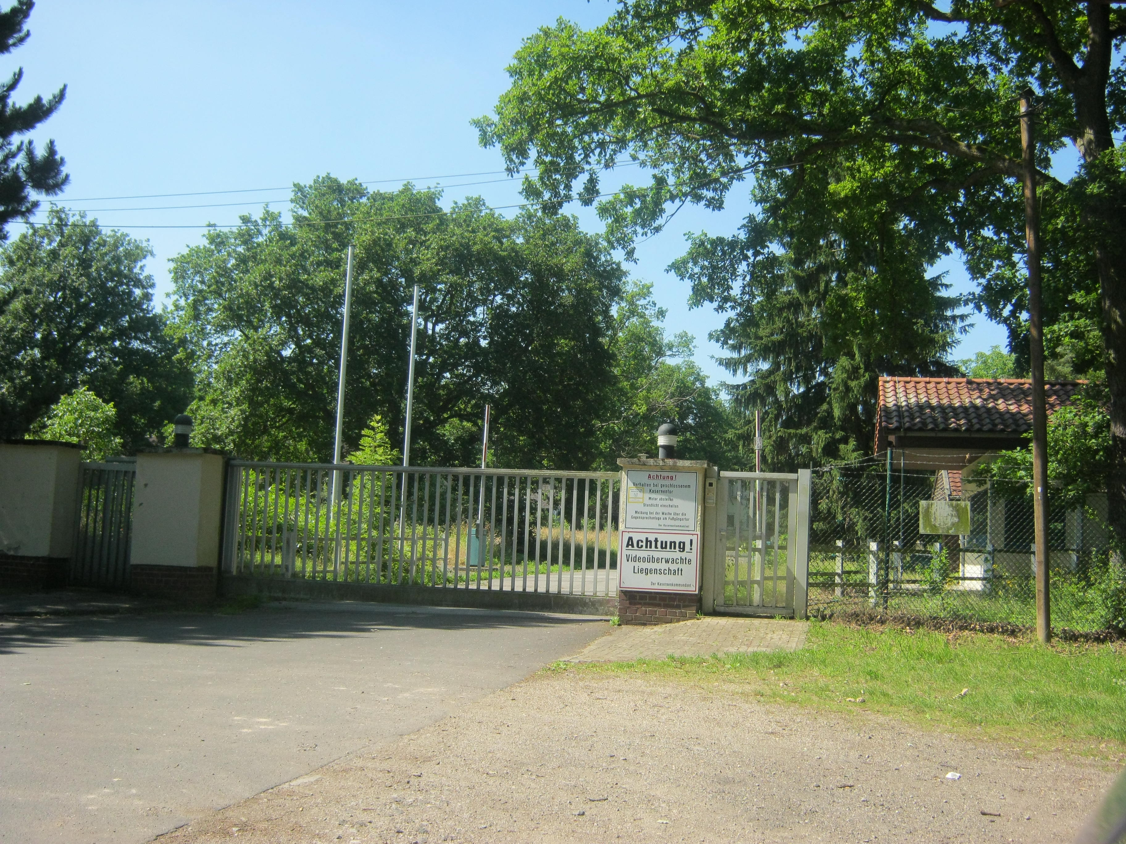 Tor Kaserne Gürzenich-Wald 1